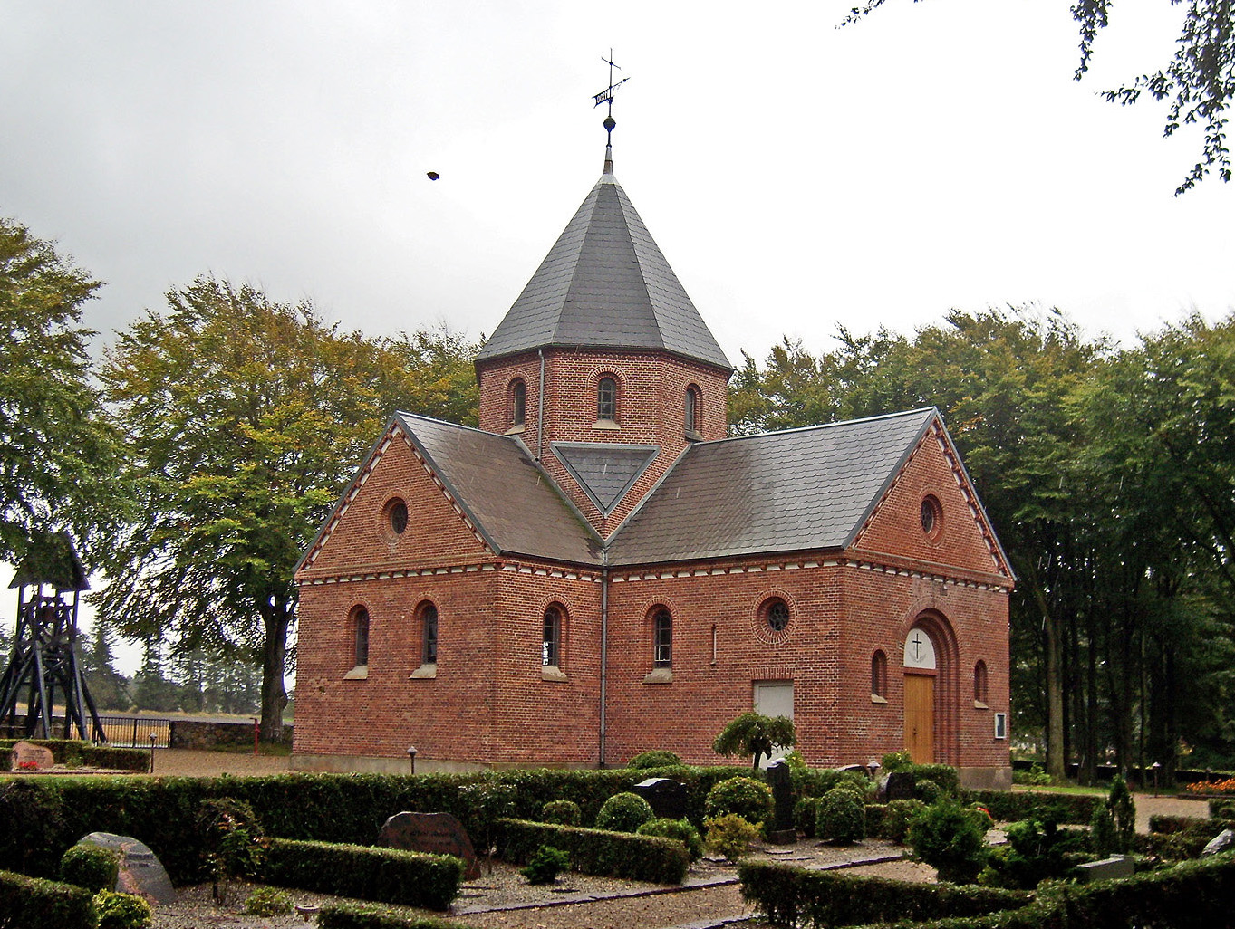 fra nordvest